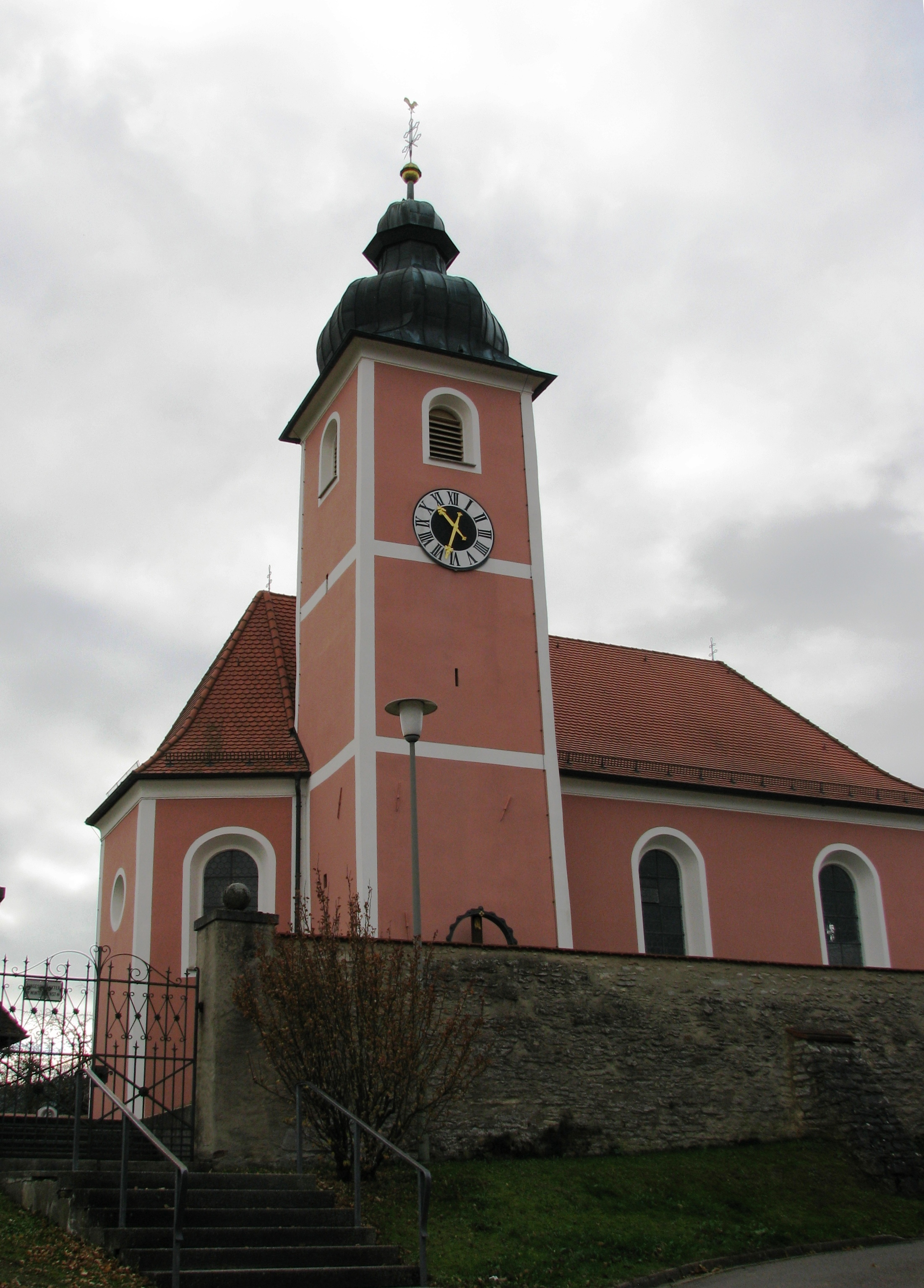 Großberghausen, Ortsteil von Freystadt im Landkreis Neumarkt in der Oberpfalz, Filialkirche Hl. Dreifaltigkeit